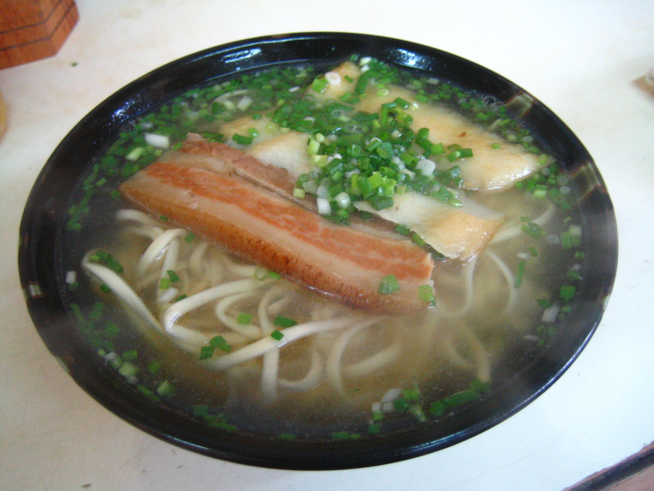 at Daruma Soba, an okinawan noodle house, in Naha, Okinawa